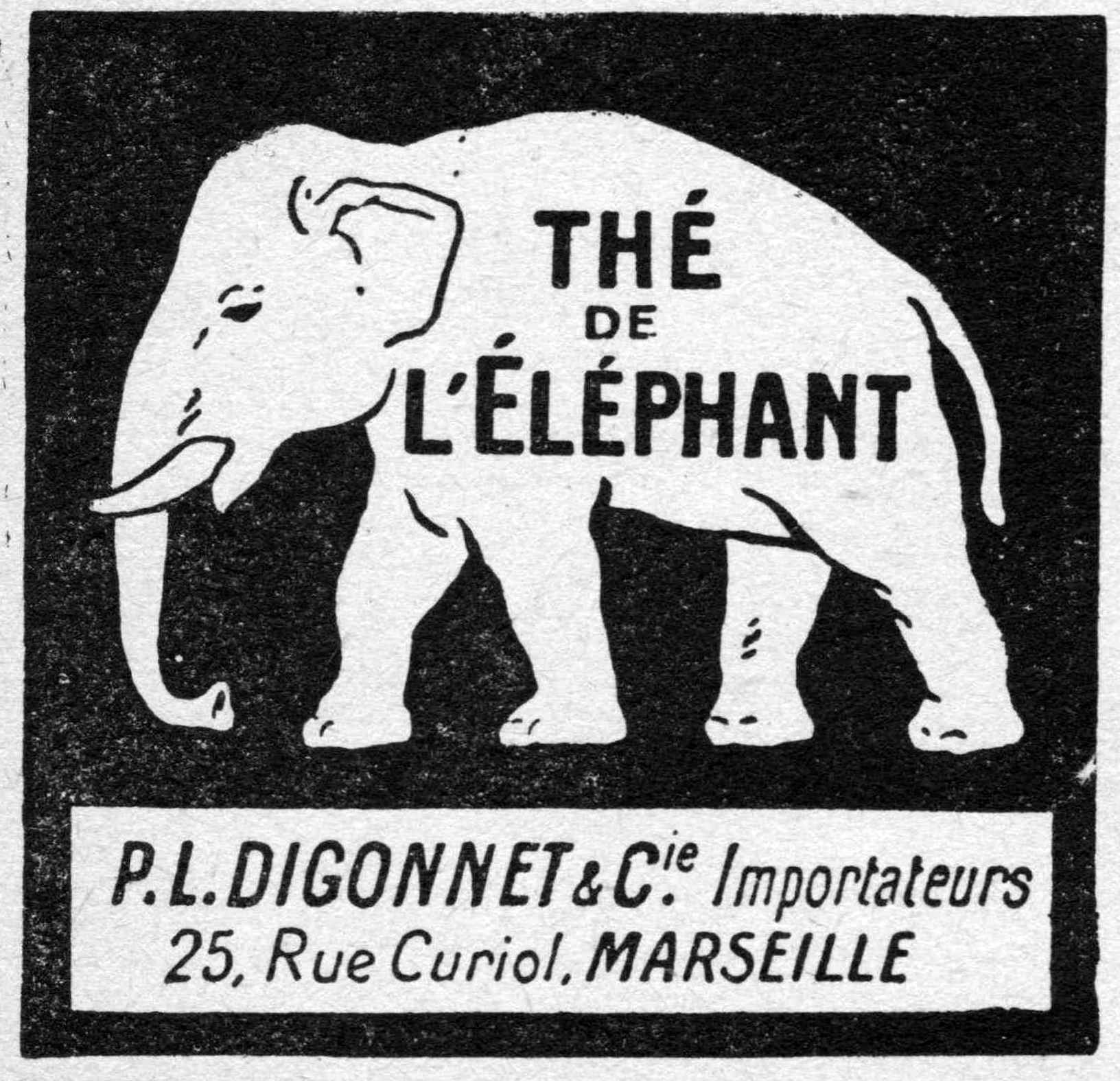 Scan of L'ILLUSTRATION No 3910. L'ILLUSTRATION No3910 9 Février 1918, Thé de l'Eléphant.